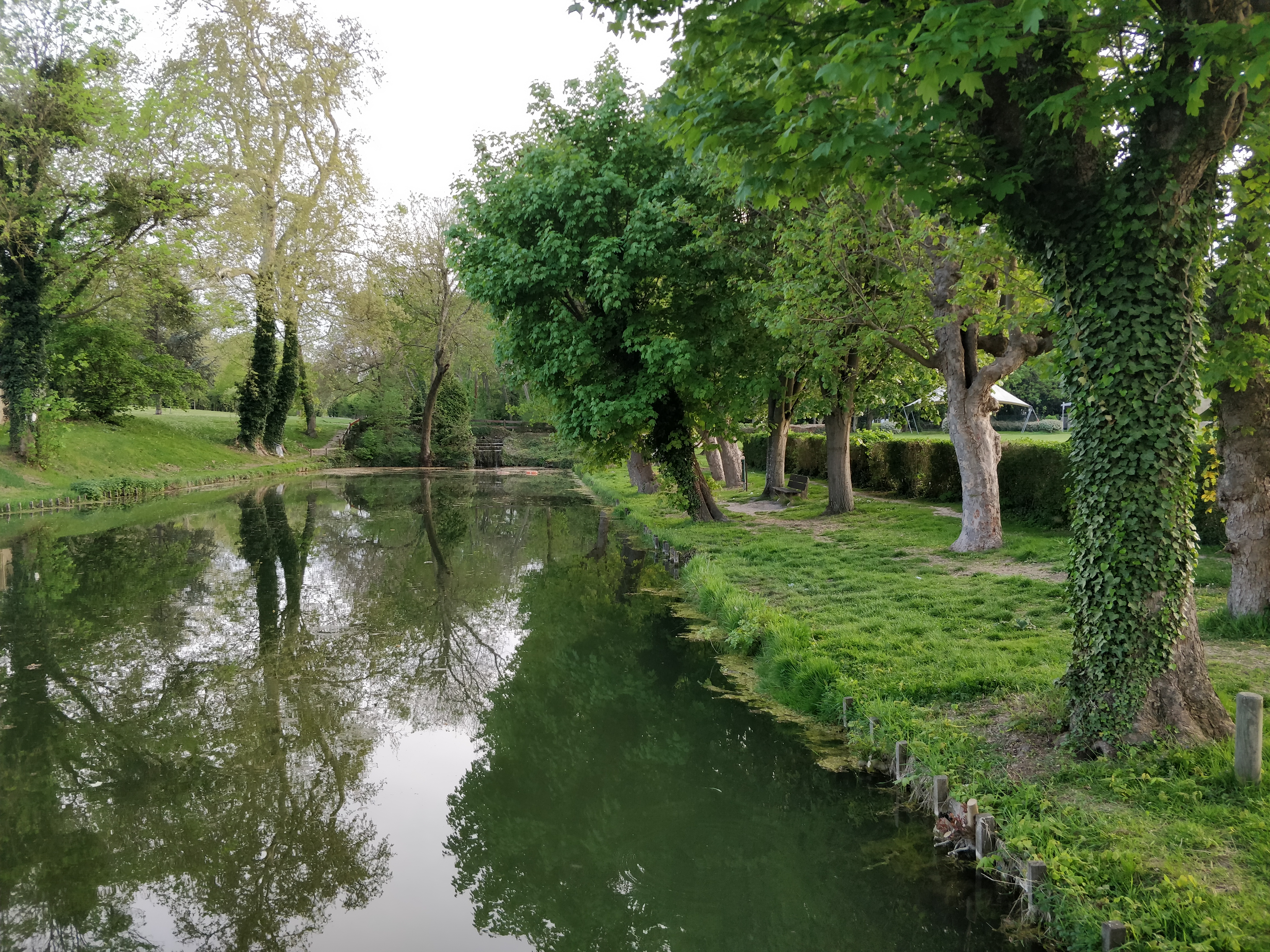 Parc Arthur Clark, Wissous, France.